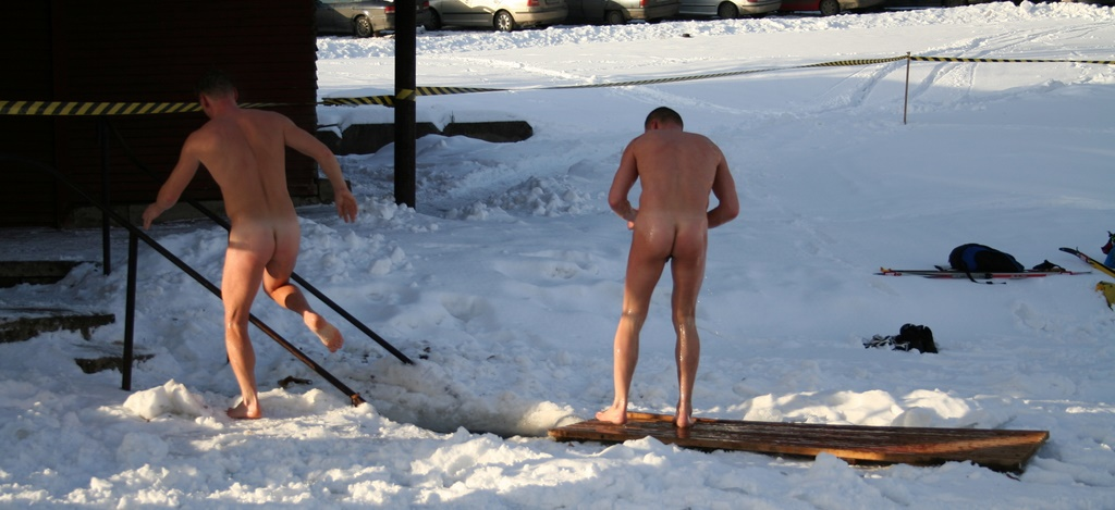 Cooling down near sauna